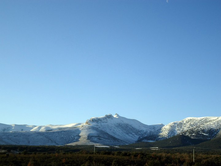 Peñas de Herrera